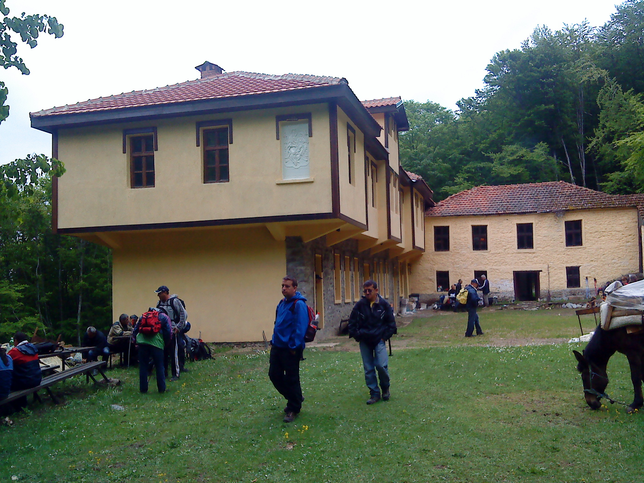 Манастирски конаци на 1400 н.в кај црква Св. Ана село Маловиште